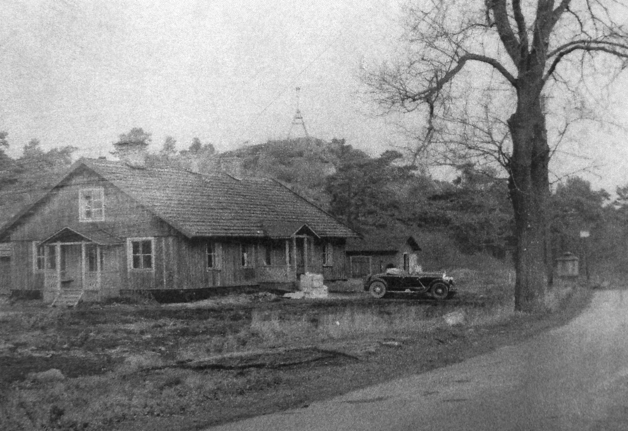 Grynkvarns gård vid Huddingevägen (idag Johanneshovsvägen) omkring 1930. I bakgrunden höjden vid Sköntorpsplan.